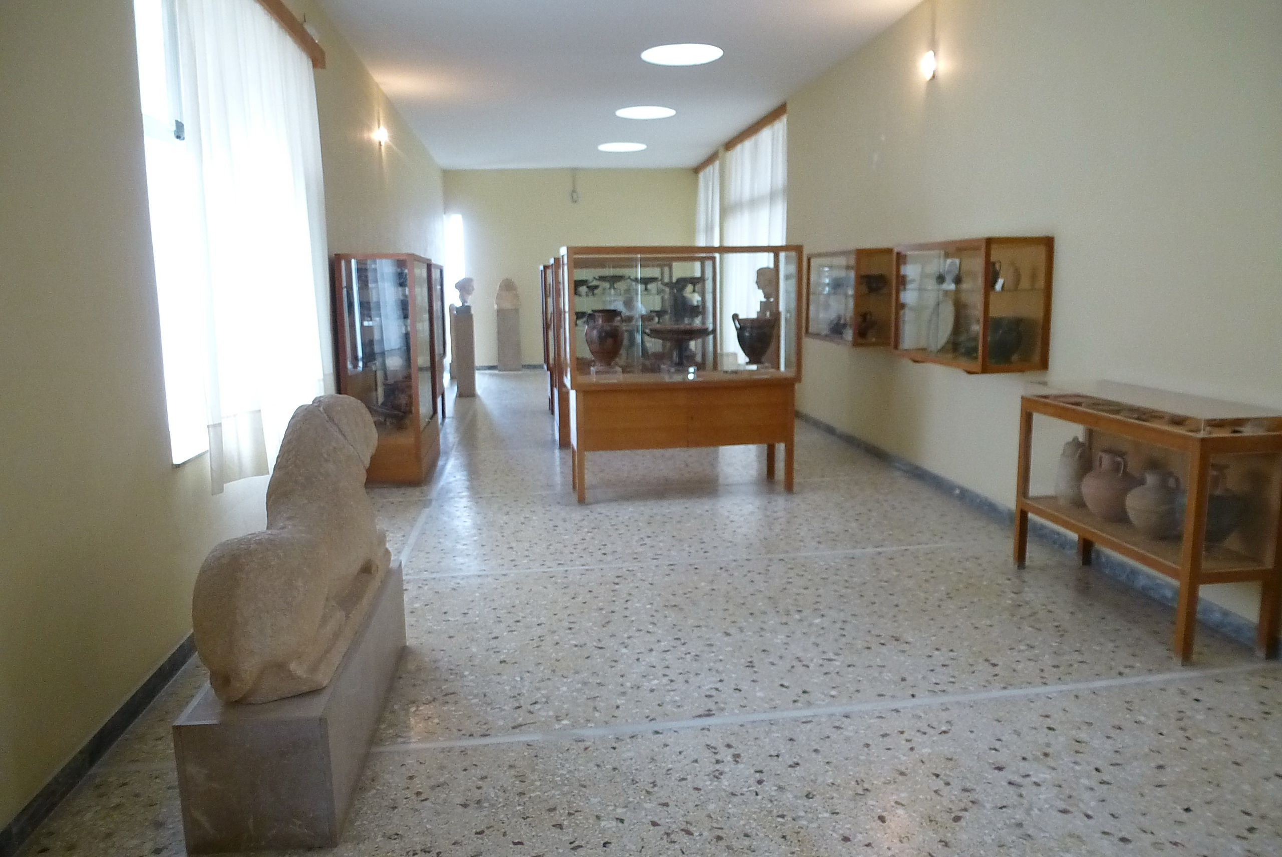 Santorini, Fira-Thira, Archäologisches Museum